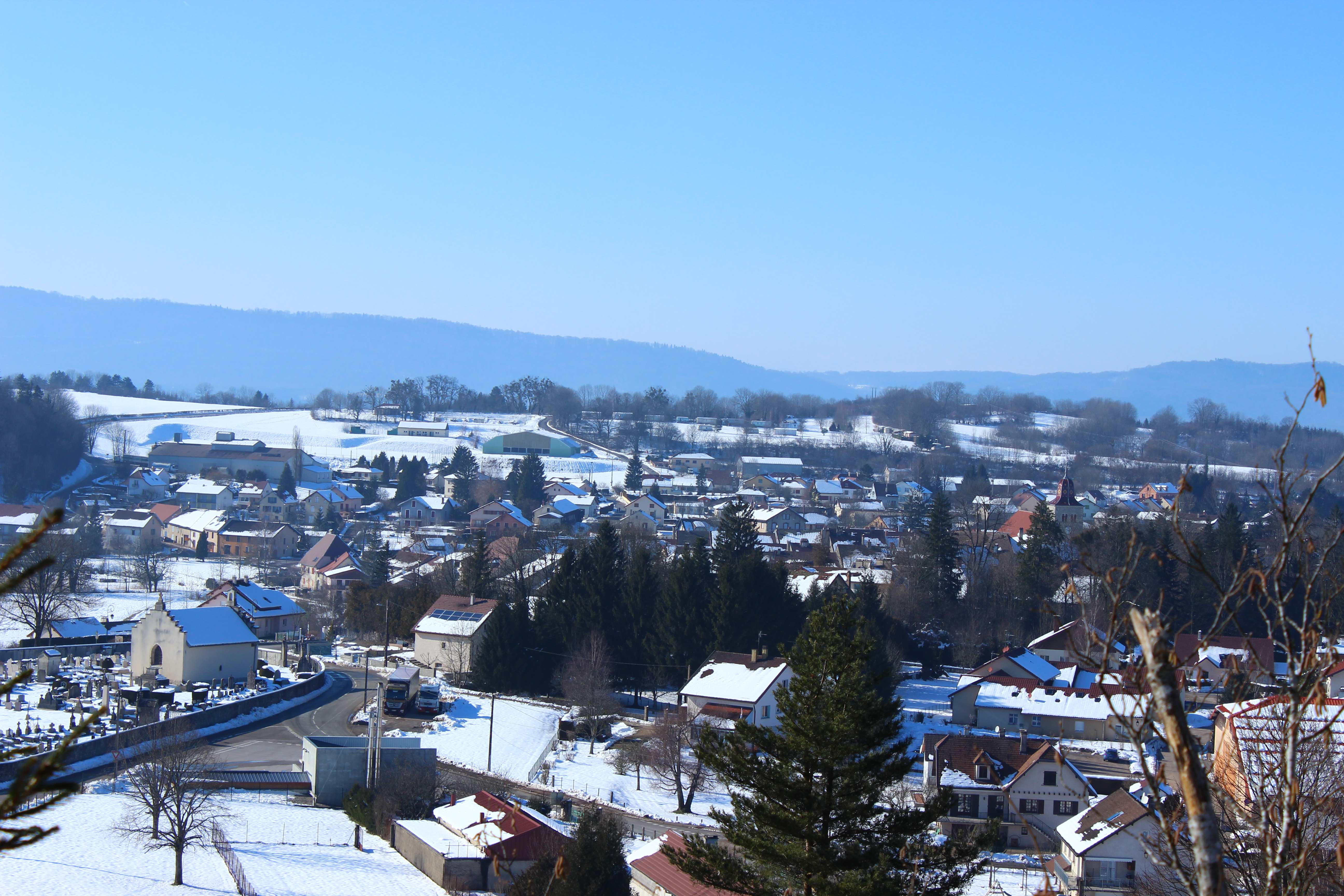 Le village de Clairvaux-les-Lacs (Jura, France) vu depuis l'est en hiver.